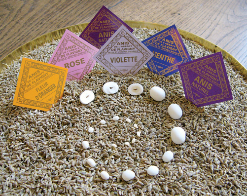 Chaque Anis cache en son cœur une petite graine...